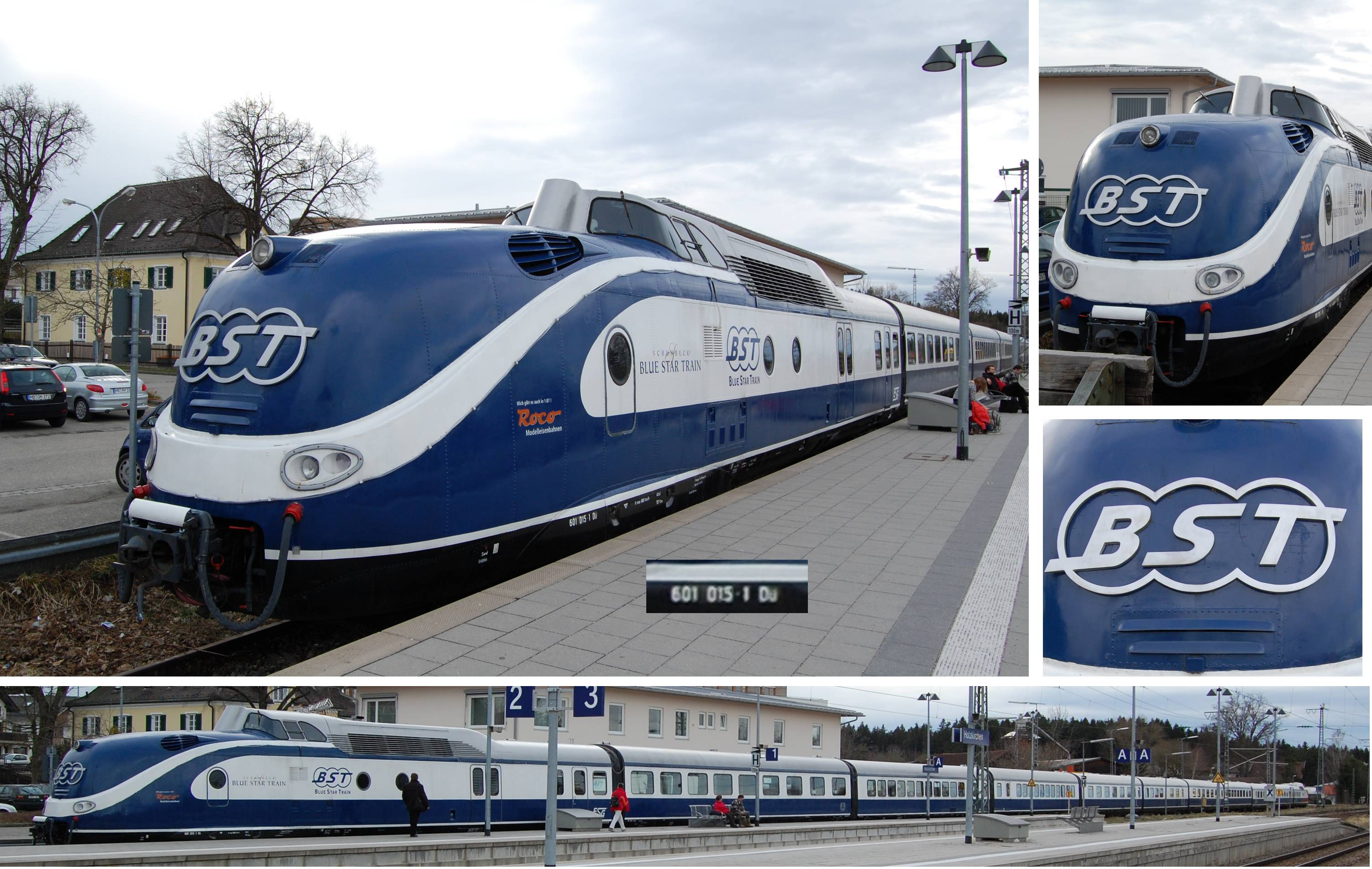 Alfons Schuhbecks Blue Star Train / TEE 601-015